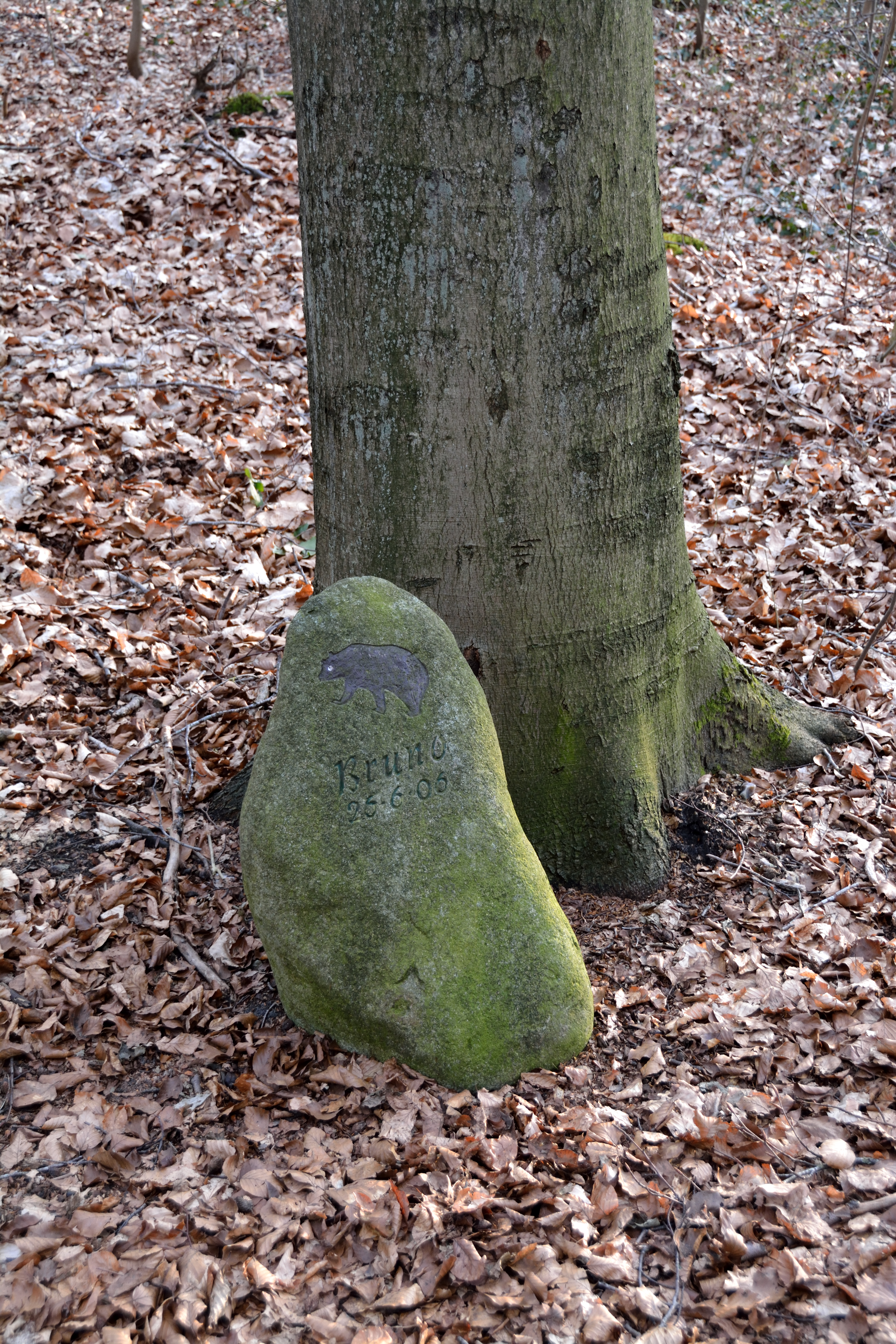 Ein Gedenkstein für den Problembären Bruno (JJ1) am Europäischen Fernwanderweg E1 in Itzehoe.